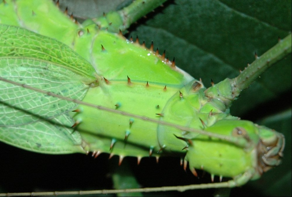 photo de phasme